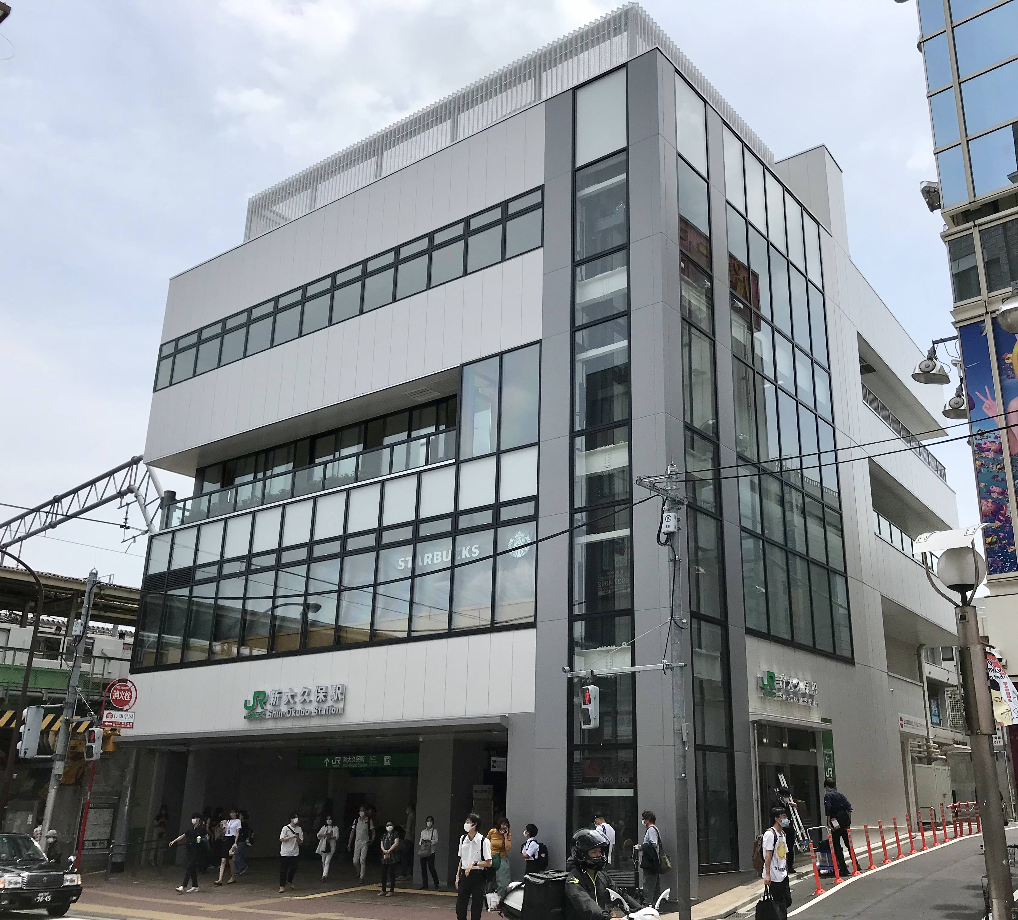 JR東日本山手線新大久保駅新駅舎